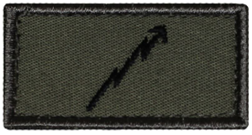 Chef Telematik